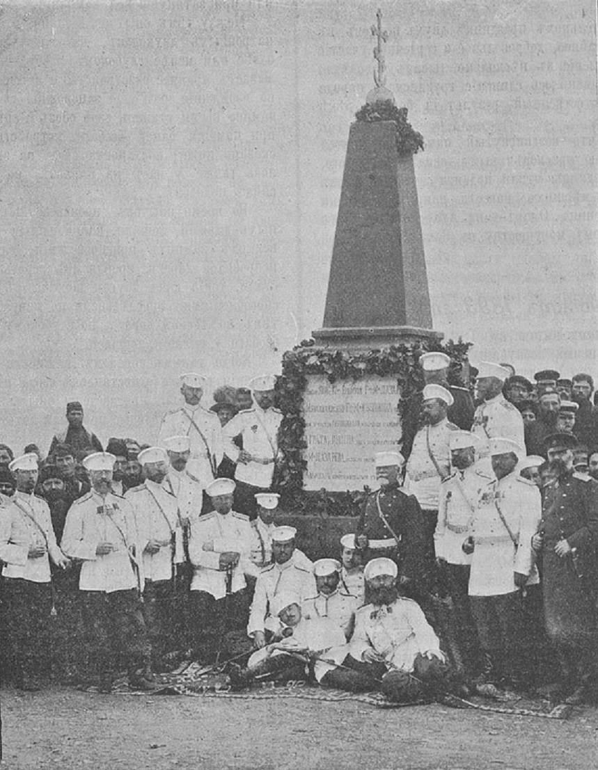 Группа офицеров-депутатов от Эриванского и Кабардинского полков во время освящения памятника в честь битвы на реке Иори.